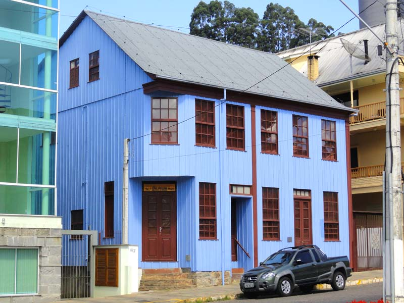 Centro Histórico de Antônio Prado - Casa Grezzana. A casa foi construída entre 1906 e 1915 por Giacomo Grezzana, para habitá-la com a família. A casa possuía muitos quartos e serviu também como pensão. Um de seus filhos herdou-a e continuou a habitá-la, mas no térreo passou a funcionar a Exatoria Municipal, onde ele trabalhava. A casa sofreu reformas em 1948 e 1952, perdendo seu telhado original de telhas de madeira rachada.